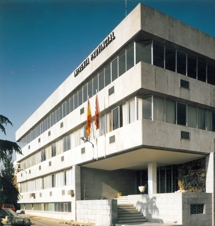 Imagen portada